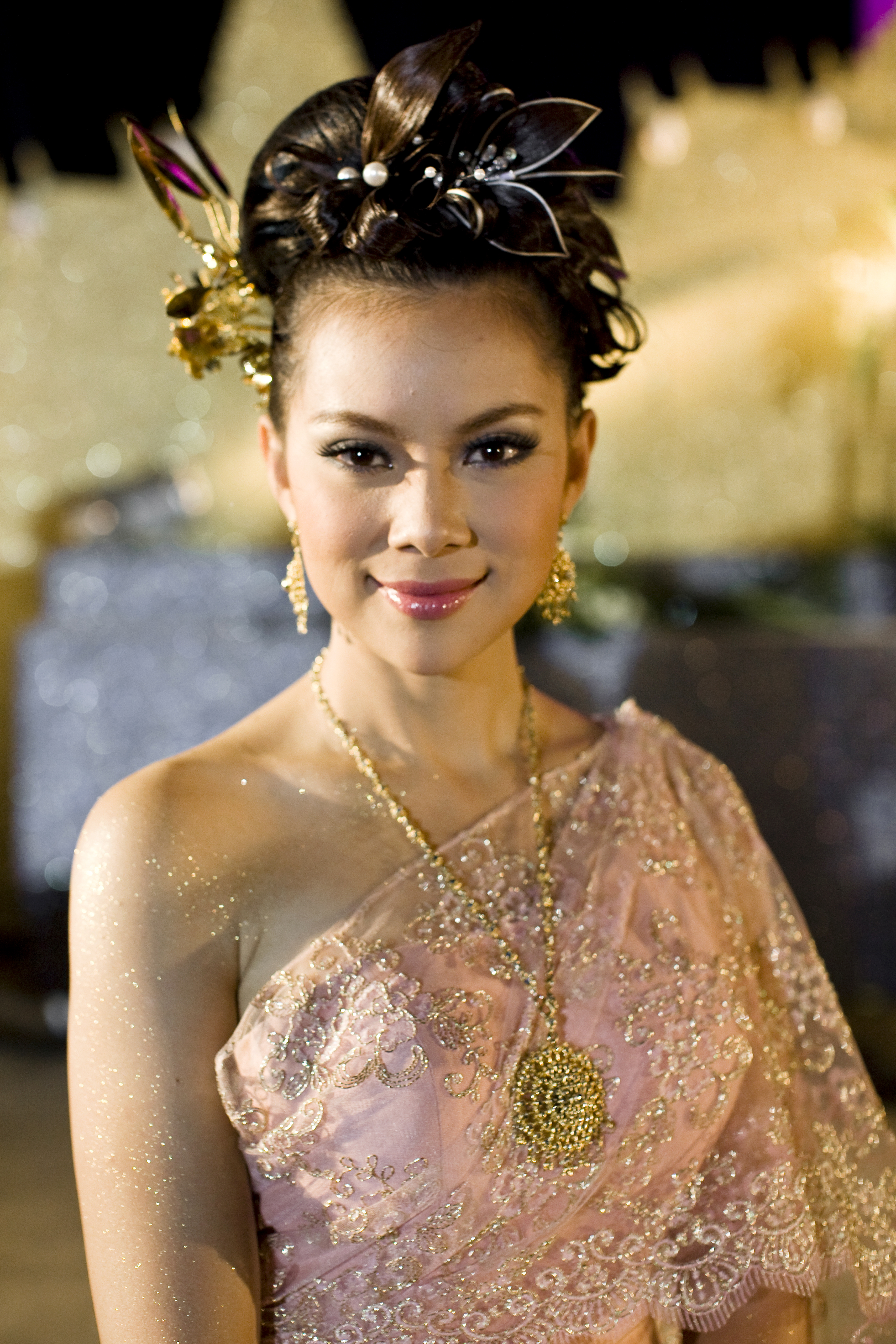 ปนัดดา วงศ์ผู้ดี นางสาวไทยประจำปี พ.ศ. 2543 / นายอภิสิทธิ์ เวชชาชีวะ นายกรัฐมนตรี เป็นประธานในพิธีปิดงานเฉลิมพระเกียรติพระบาทสมเด็จพระเจ้าอยู่หัว เนื่องในโอกาสมหามงคลเฉลิมพระชนมพรรษา 82 พรรษา 5 ธันวาคม 2552 ณ อนุสาวรีย์ประชาธิปไตย ถนนราชดำเนิน 13ธันวาคม2552 (The Official Site of The Prime Minister of Thailand Photo by พีรพัฒน์ วิมลรังครัตน์)